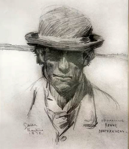 Kuhmolainen Renne Haverinen toimi Akseli Gallen-Kallelan ja Louis Sparren oppaana näiden maalausretkellä Kainuussa ja Vienan Karjalassa vuonna 1890. Gallen-Kallelan lyijykynäpiirros.